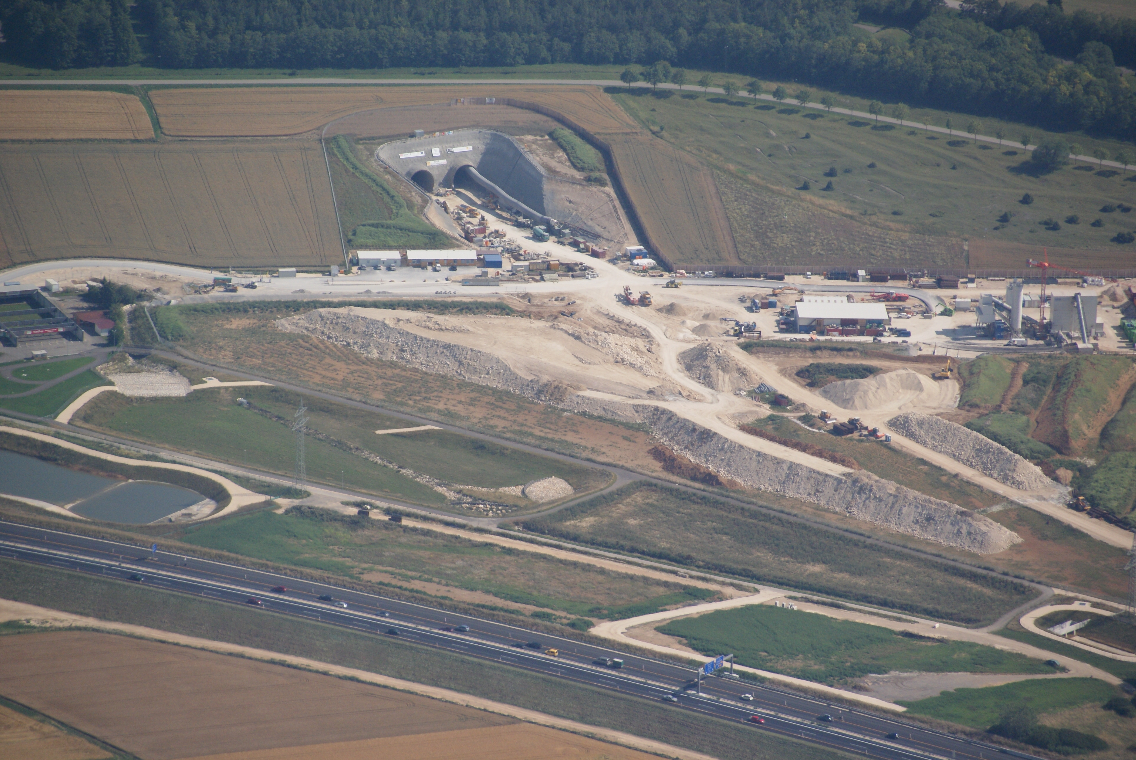 Neubaustrecke Wendlingen–Ulm: Albabstiegstunnel, Nordportal bei Dornstadt